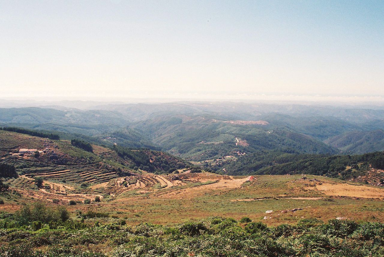 Fotografia tirada da Foia, ponto mais alto do Algarve.